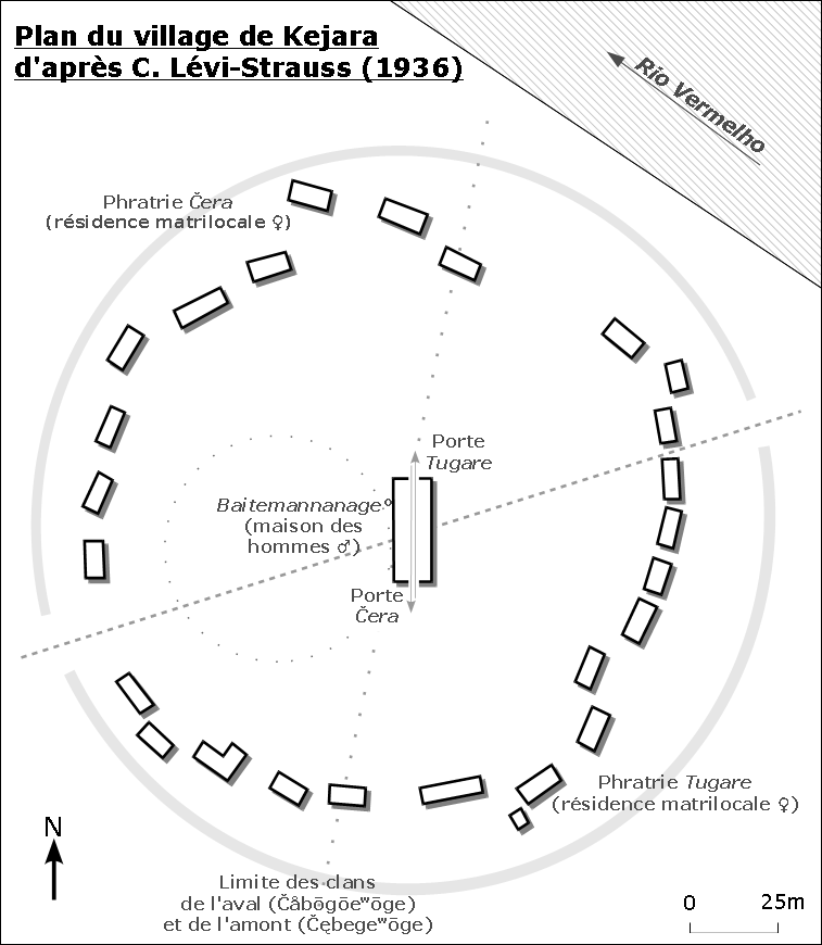 Plan retravaillé du village Bororo de Kejara dont Claude Lévi-Strauss donne la description dans un article du Journal de la Société des Américanistes en 1936. Ce plan diffère celui proposé par l'anthropologue lui-même en le réorientant, en supprimant des points de la légende (les distances qui peuvent être confondu avec des lignes de divisions de la société bororo) et en apportant des éléments d'explication de l'organisation de la société Bororo explicités dans l'article(C. Lévi-Strauss, "Contribution à l'étude de l'organisation sociale des Indiens Bororo", Journal de la Société des Américanistes, 28-2, 269-304, 1936